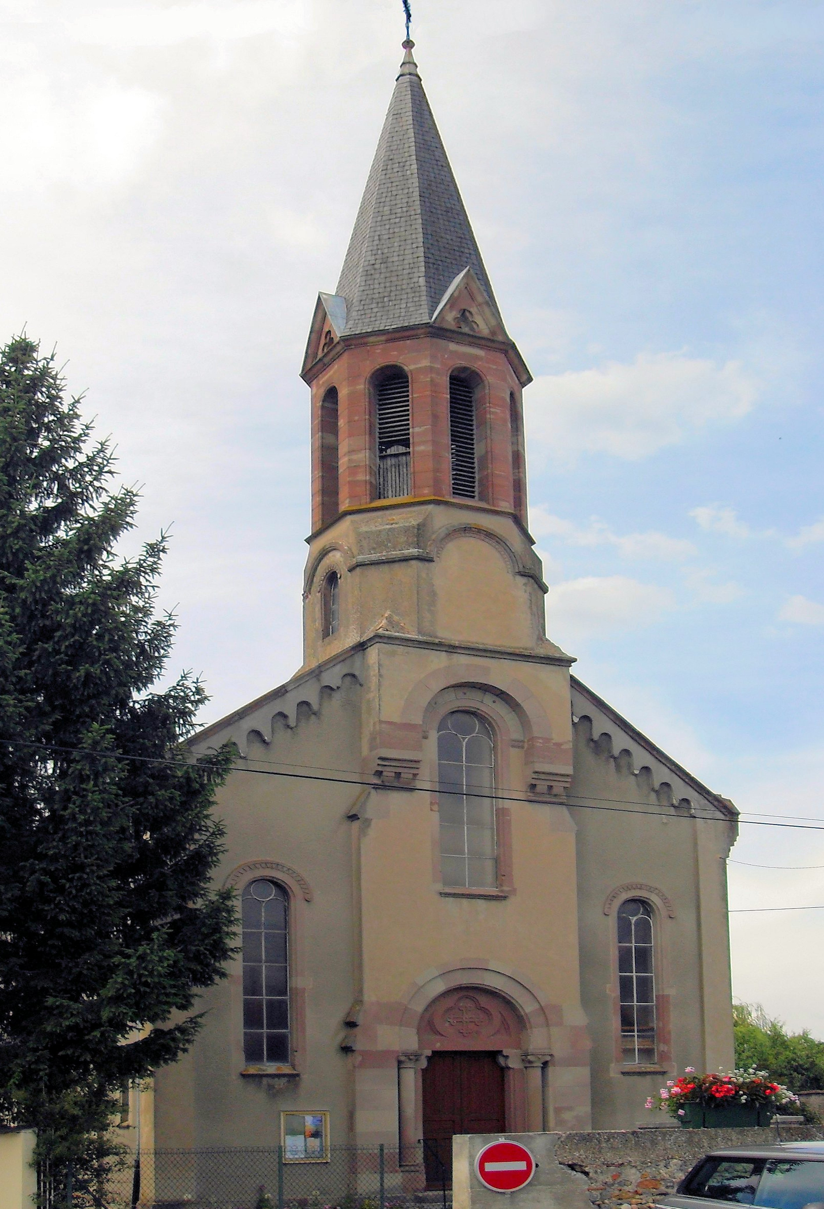 L'église protestante à Wolfgantzen